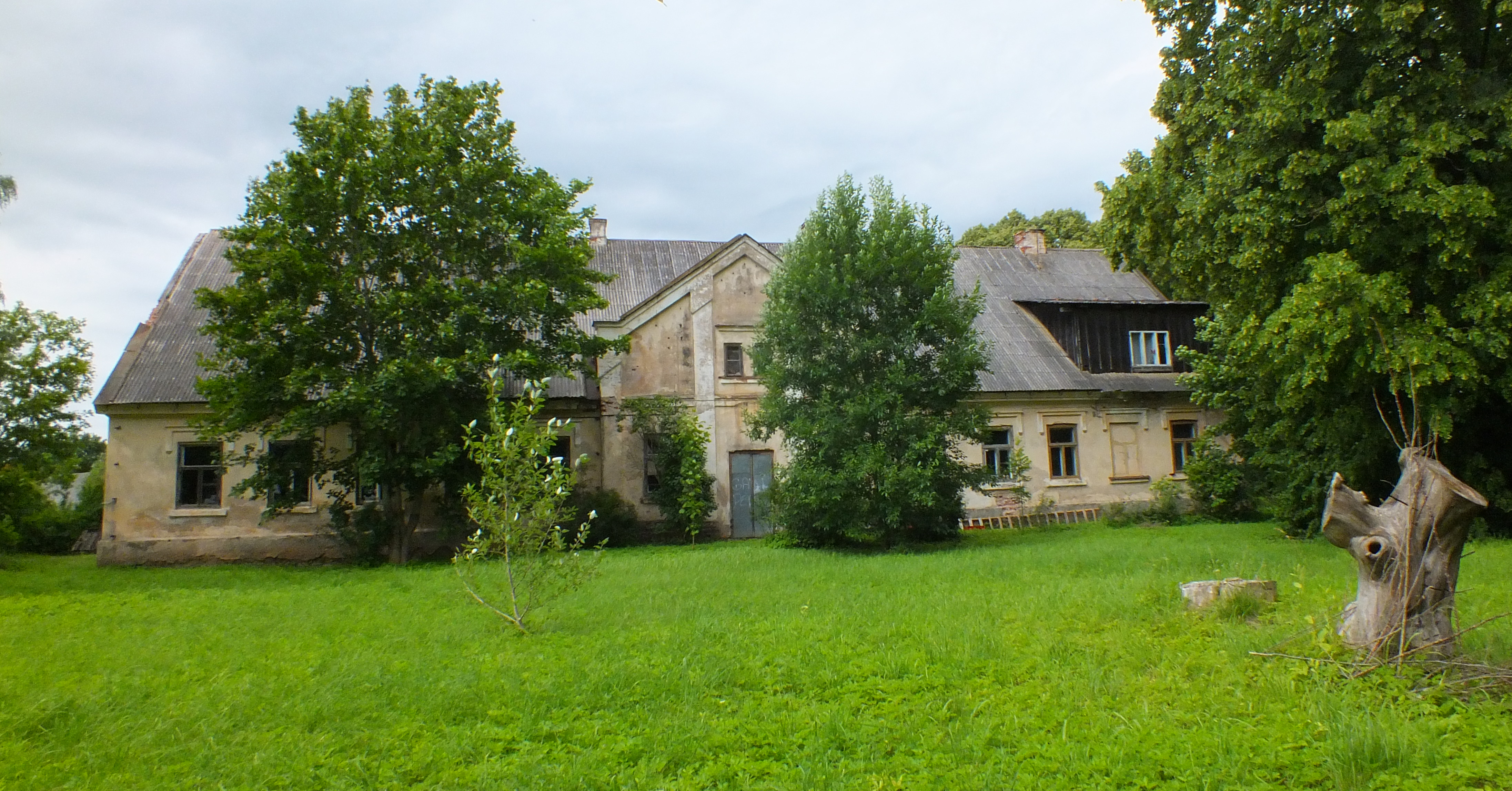 Grenču muižas kungu māja